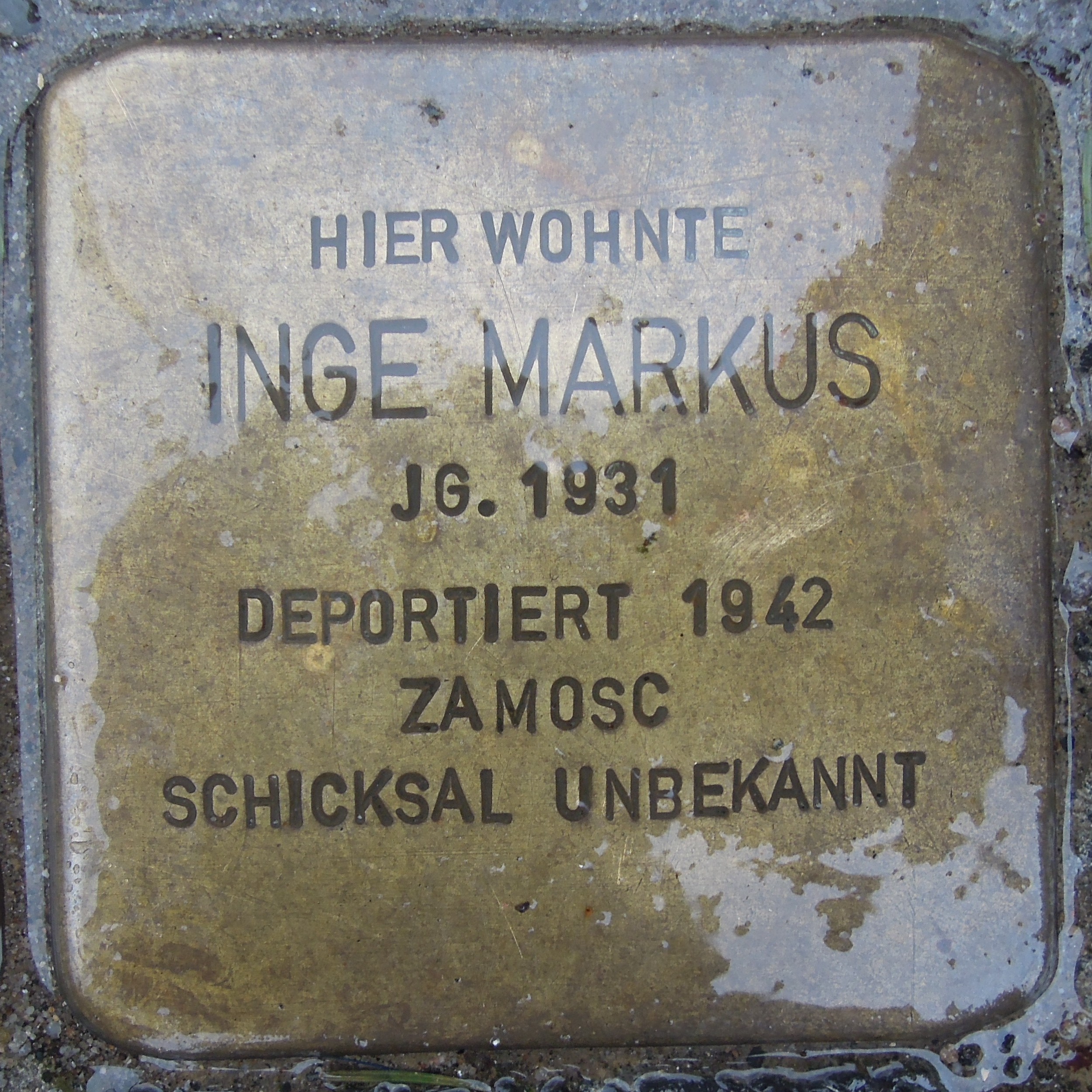 Stolperstein Hattingen Bahnhofstraße 6 für Inge Markus